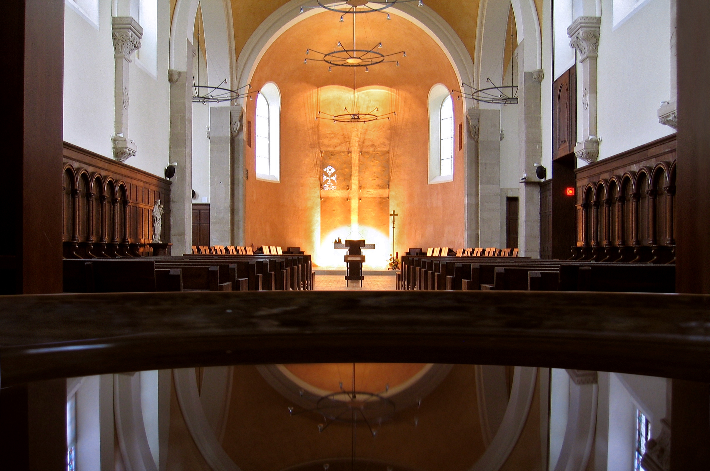 Église abbatiale de l'abbaye ND de Jouarre (Seine & Marne) et reflet dans le bénitier.